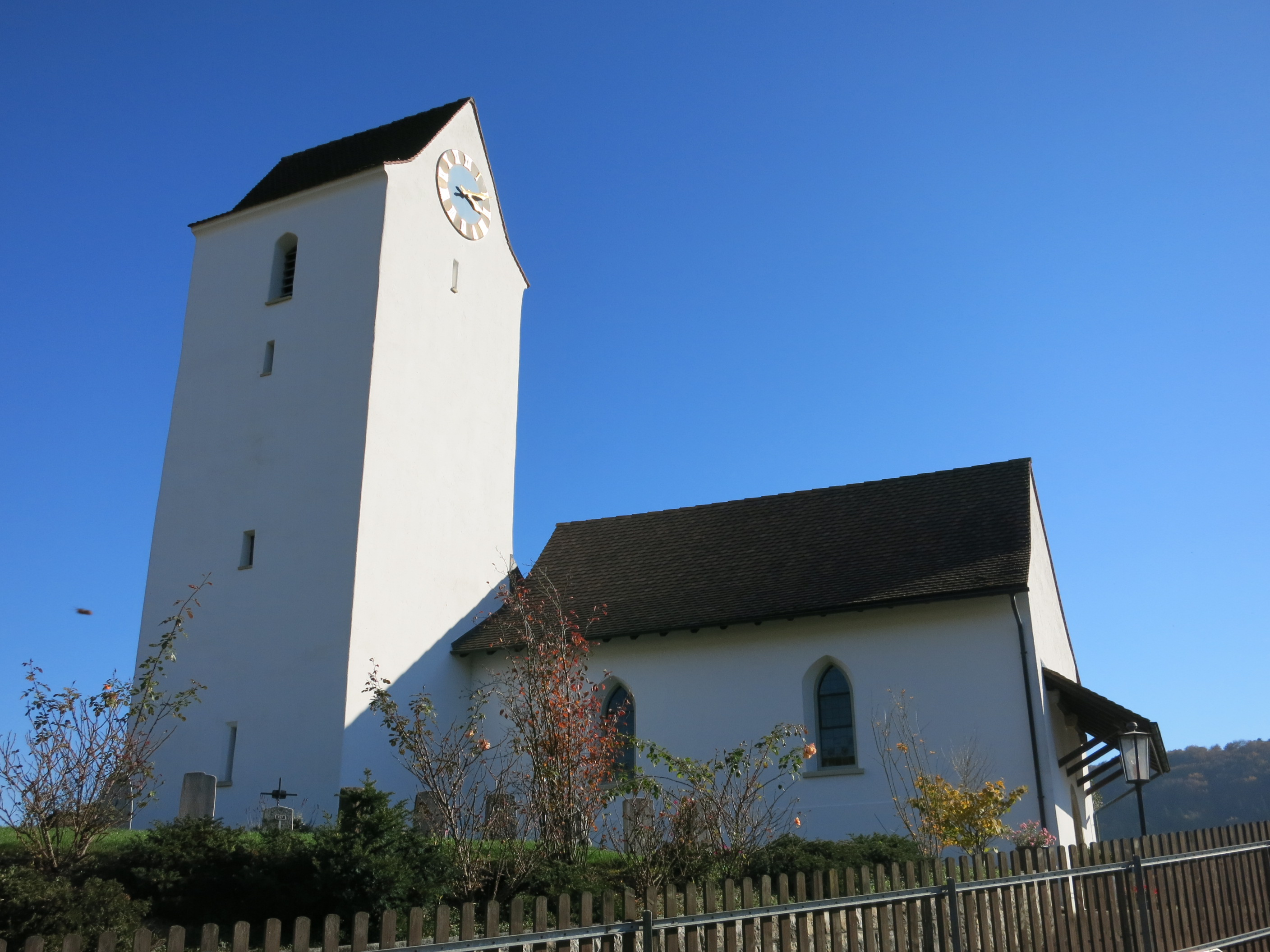 Reformierte Kirche Mönthal AG, Schweiz